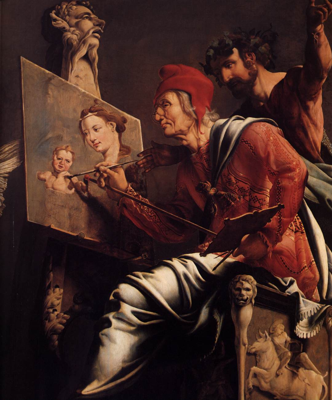 detail